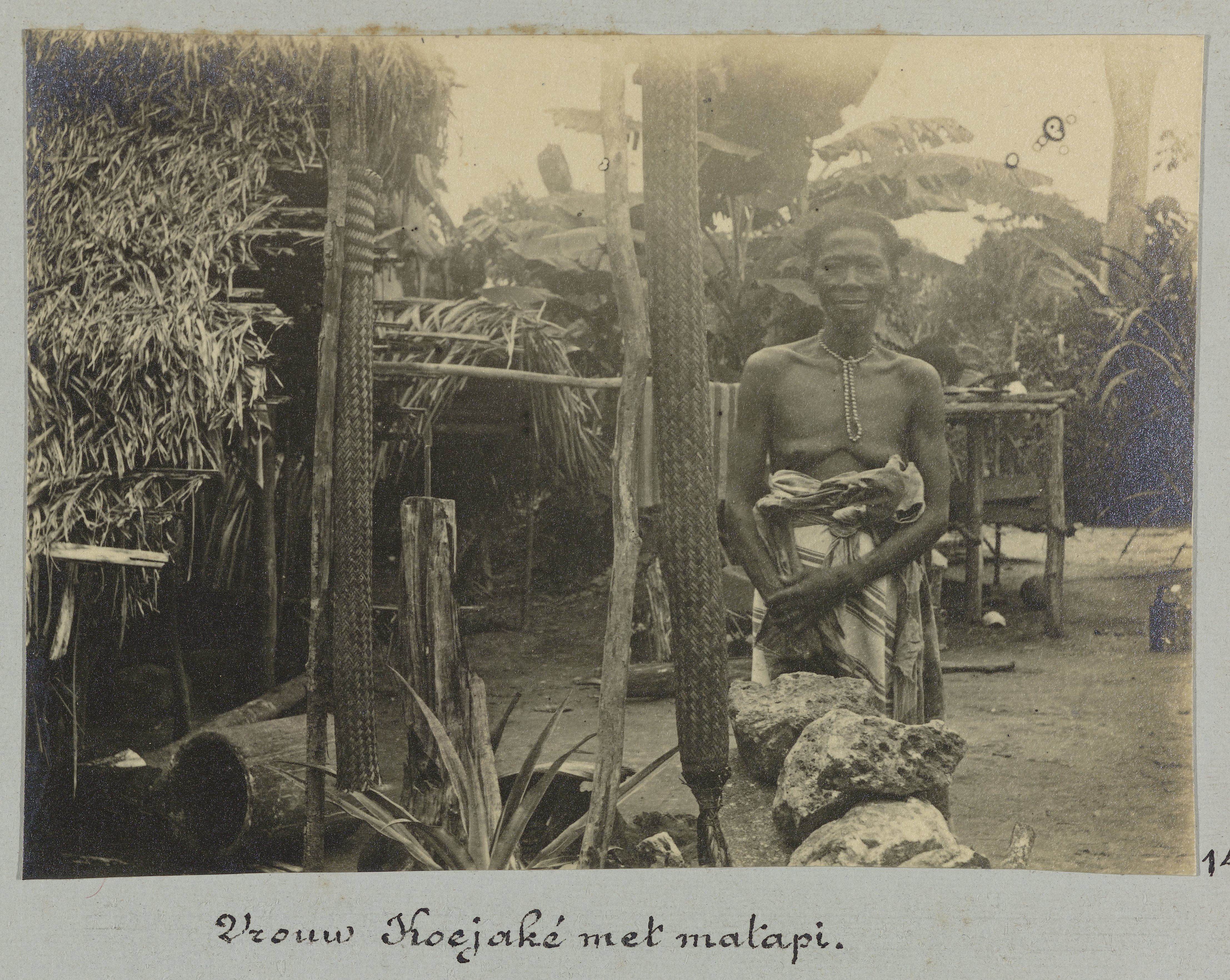 IdentificatieTitel(s): Vrouw Koejaké met matapi (titel op object)Objecttype: foto Objectnummer: NG-1994-65-1-14-2Opschriften / Merken: opschrift, bij de foto, handgeschreven: ‘14. / Vrouw Koejaké met matapi.’Omschrijving: Een vrouw (mogelijk genaamd Koejaké) staande bij een matapi (gevlochten koker gevuld met geraspte cassave). Onderdeel van het fotoalbum Souvenir de Voyage (deel 1), over het leven van de familie Doijer in en rond de plantage Ma Retraite in Suriname in de jaren 1906-1913.VervaardigingVervaardiger: fotograaf: Hendrik Doijer (toegeschreven aan)Plaats vervaardiging: SurinameDatering: 1906 - 1913Fysieke kenmerken: ontwikkelgelatinezilverdrukMateriaal: fotopapier Techniek: ontwikkelgelatinezilverdrukAfmetingen: foto: h 80 mm × b 112 mmOnderwerpWanneer: 1906 - 1913Waar: SurinameWie: familie DoijerVerwerving en rechtenVerwerving: aankoop 1994Copyright: Publiek domein